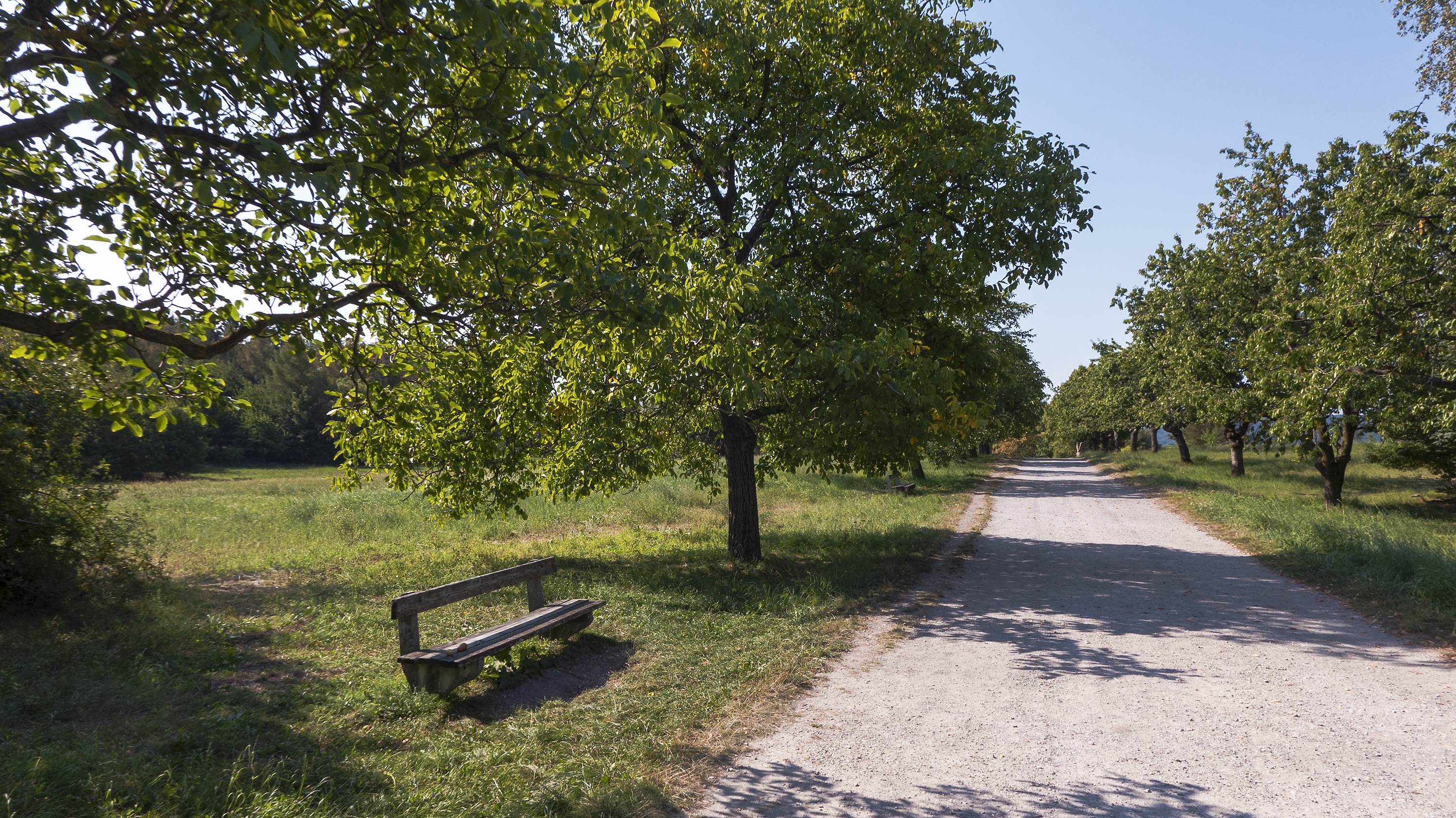 Steinhofgründe in Wien 14